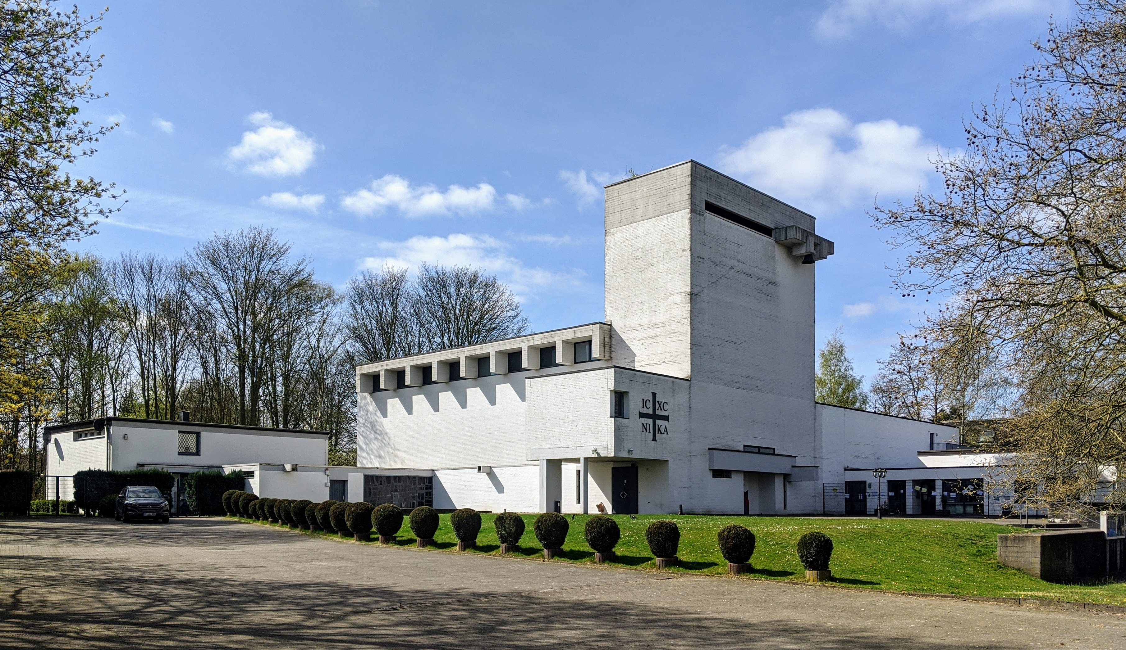 Ehemalige Simeonkirche in Hamburg-Hamm, Sievekingsallee 12, erbaut 1966 von Friedhelm Grundmann, mit Pfarrhaus (links) und Kindergarten (rechts). This is a photograph of an architectural monument. (Kirche), 14170 (Kindergarten), 14171 (Pfarrhaus)